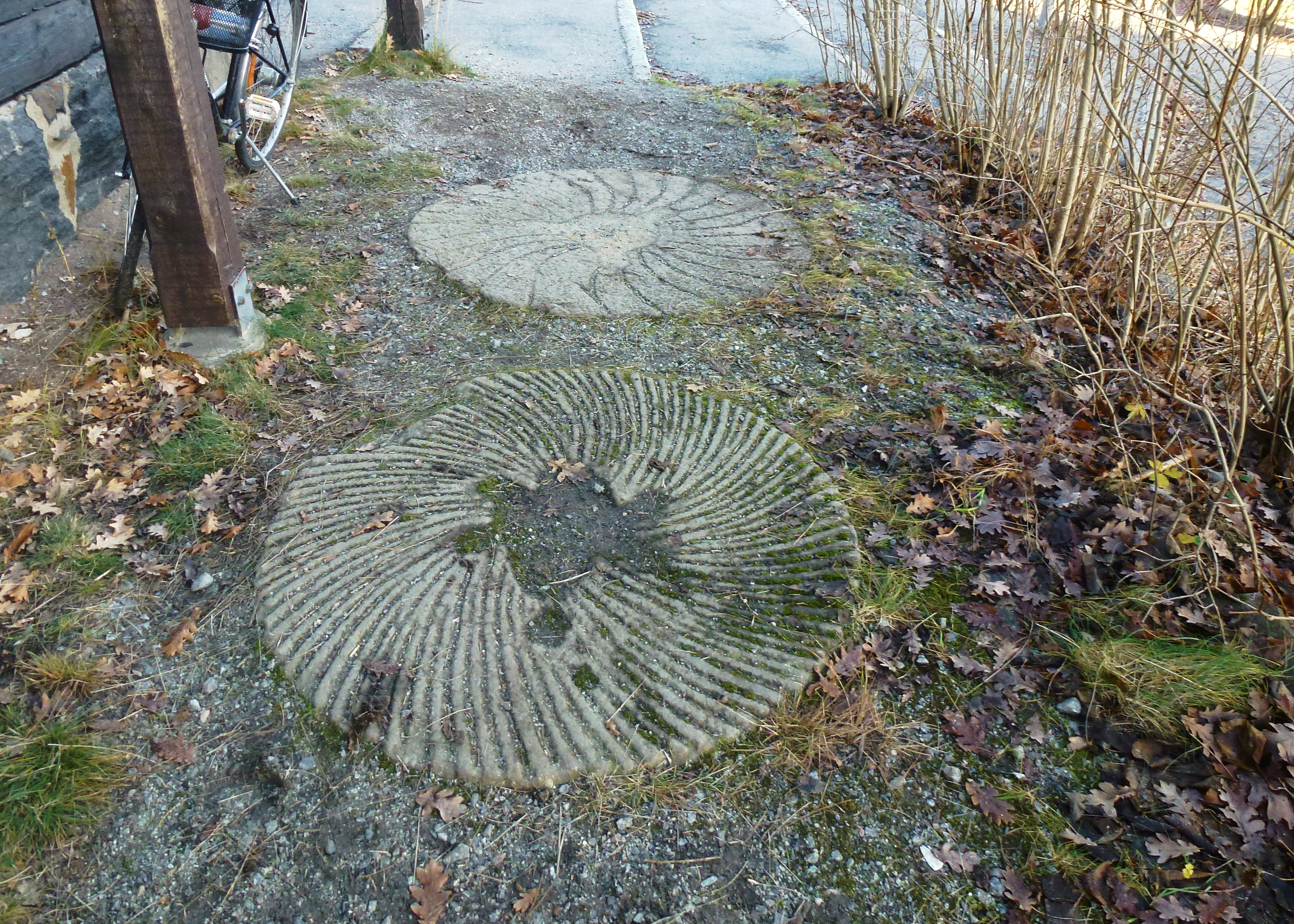 Fler kvarnstenar vid Stuvsta gårds rättarbostad.